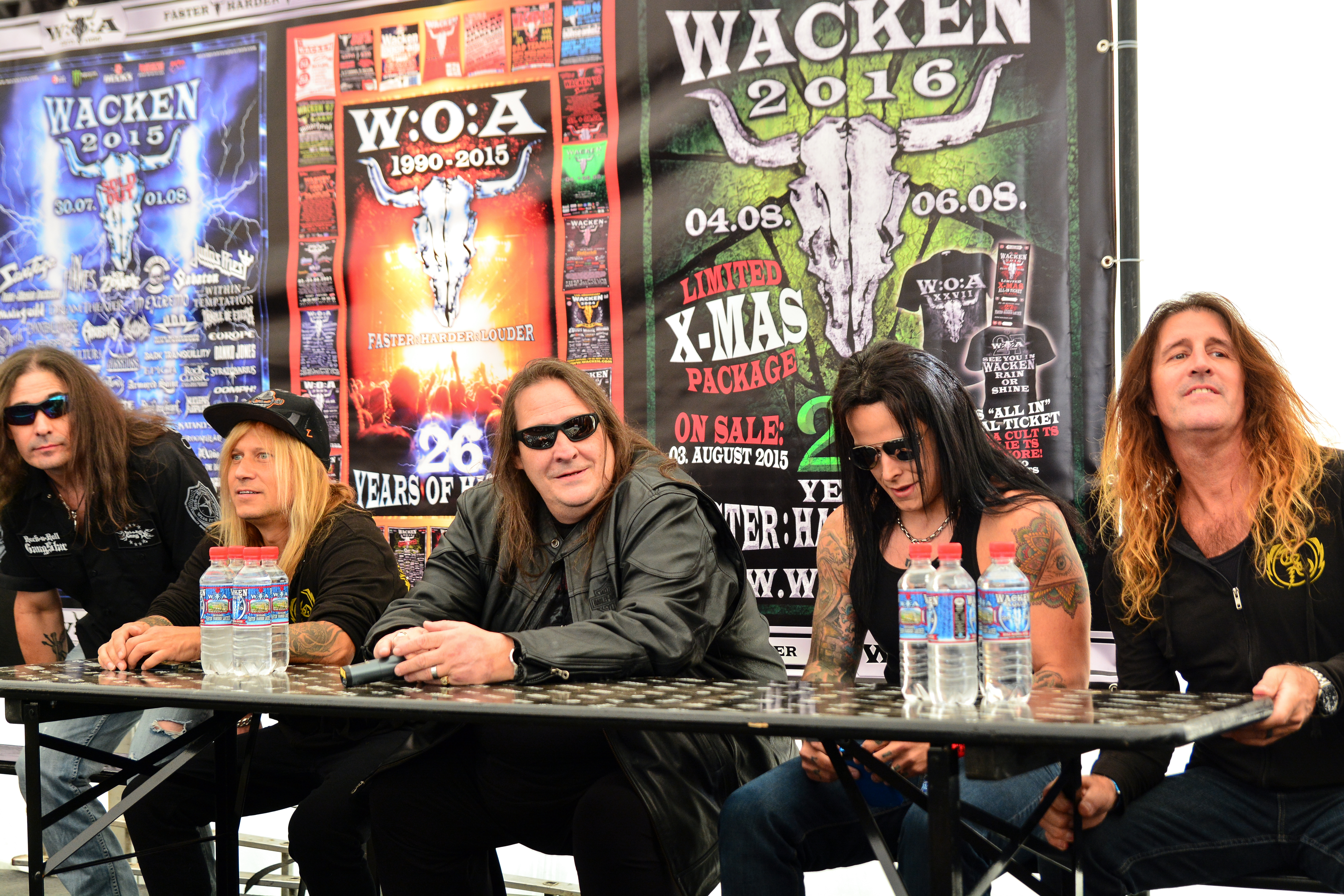 Savatage bei einer Pressekonferenz während des Wacken Open Air 2015